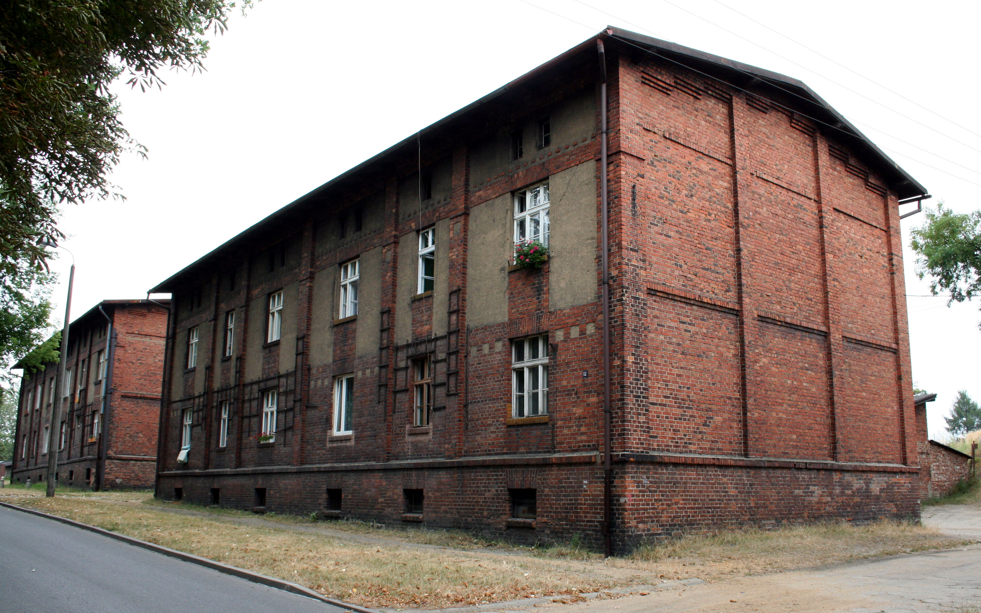 familoki w Chwałowicach